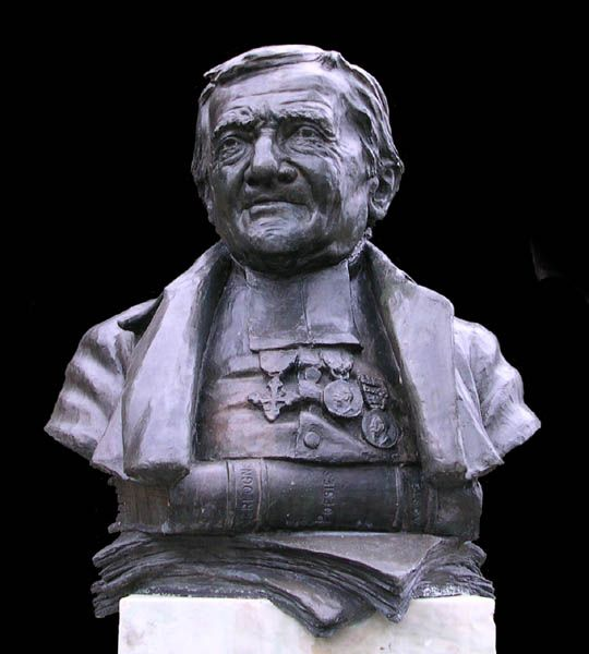 Busto dell'Abbé Cerlogne. Il Monumento dedicato all'Abbé Jean Baptiste Cerlogne si trova nel comune di Saint Nicolas, Valle d'Aosta, Italia.